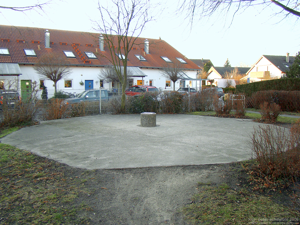 Ehemaliger "Veru-Schacht" in Bad Friedrichshall-Kochendorf (Vereinigte Untertag- und Schachtausbau GmbH)